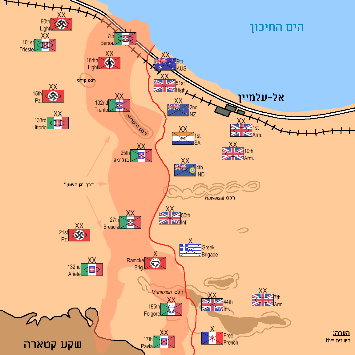 הערכות כוחות הצדדים היריבים ערב פתיחת הקרב בקרב אל-עלמיין השלישי